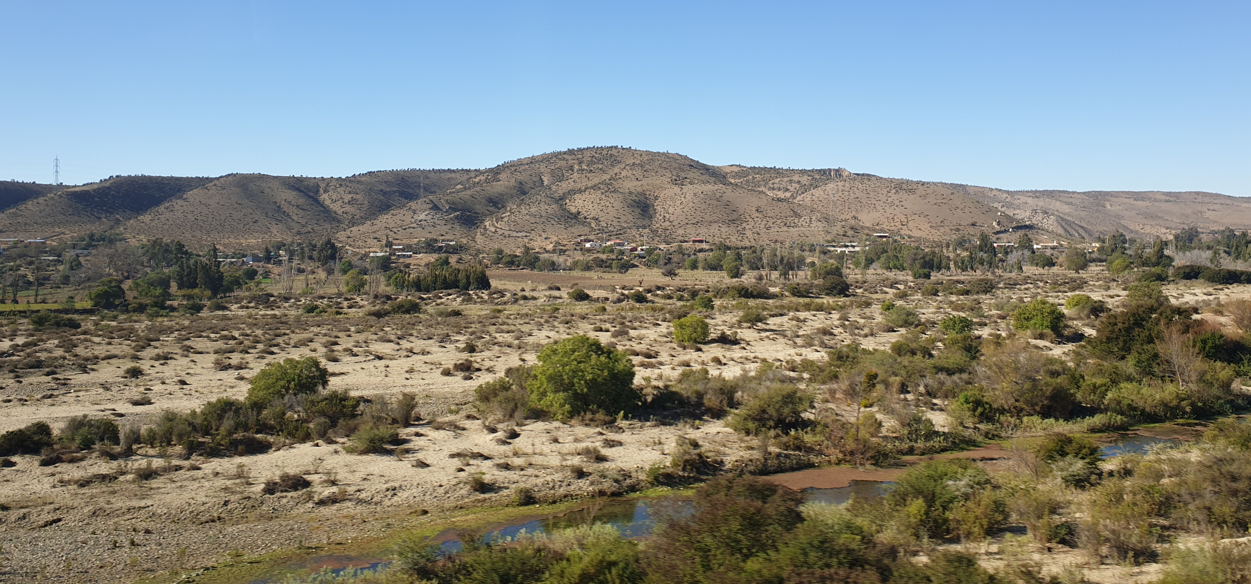 Coquimbo, Chile